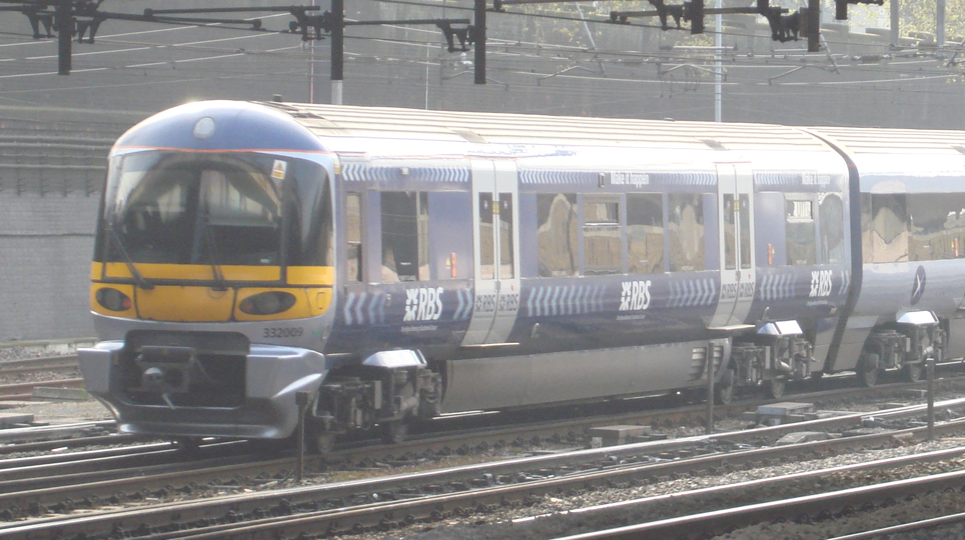 332009 passing Royal Oak tube station